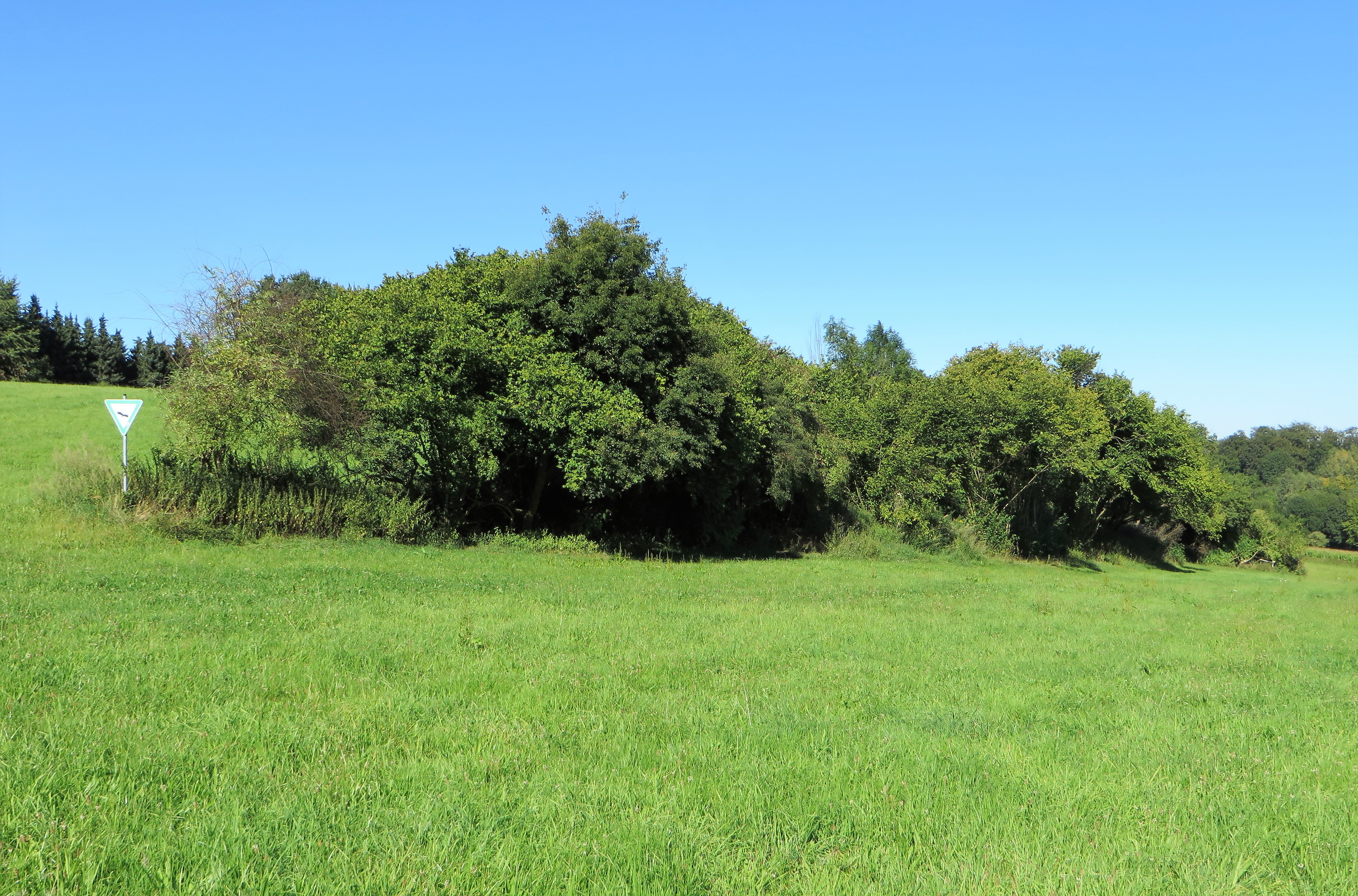 Geschützter Landschaftsbestandteil „Feldhecken Lüling“ in Hagen, südlich der Straße „Zur Hünenpforte“ nahe bei Haßley. Es handelt sich um zwei Feldhecken mit artenreichem Strauch- und Baumbestand. Im Landschaftsschutzgebiet Egge gelegen.